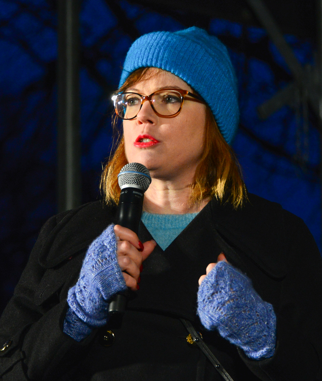 Anna Starbrink (L) under manifestationen #Vitrorpåer som vill visa sitt stöd för kvinnan som uppgett att hon våldtagits och misshandlats av flera män i Fittja men där de åtalade männen friades av tingsrätten. Norrmalmstorg i Stockholm den 14 januari 2018.